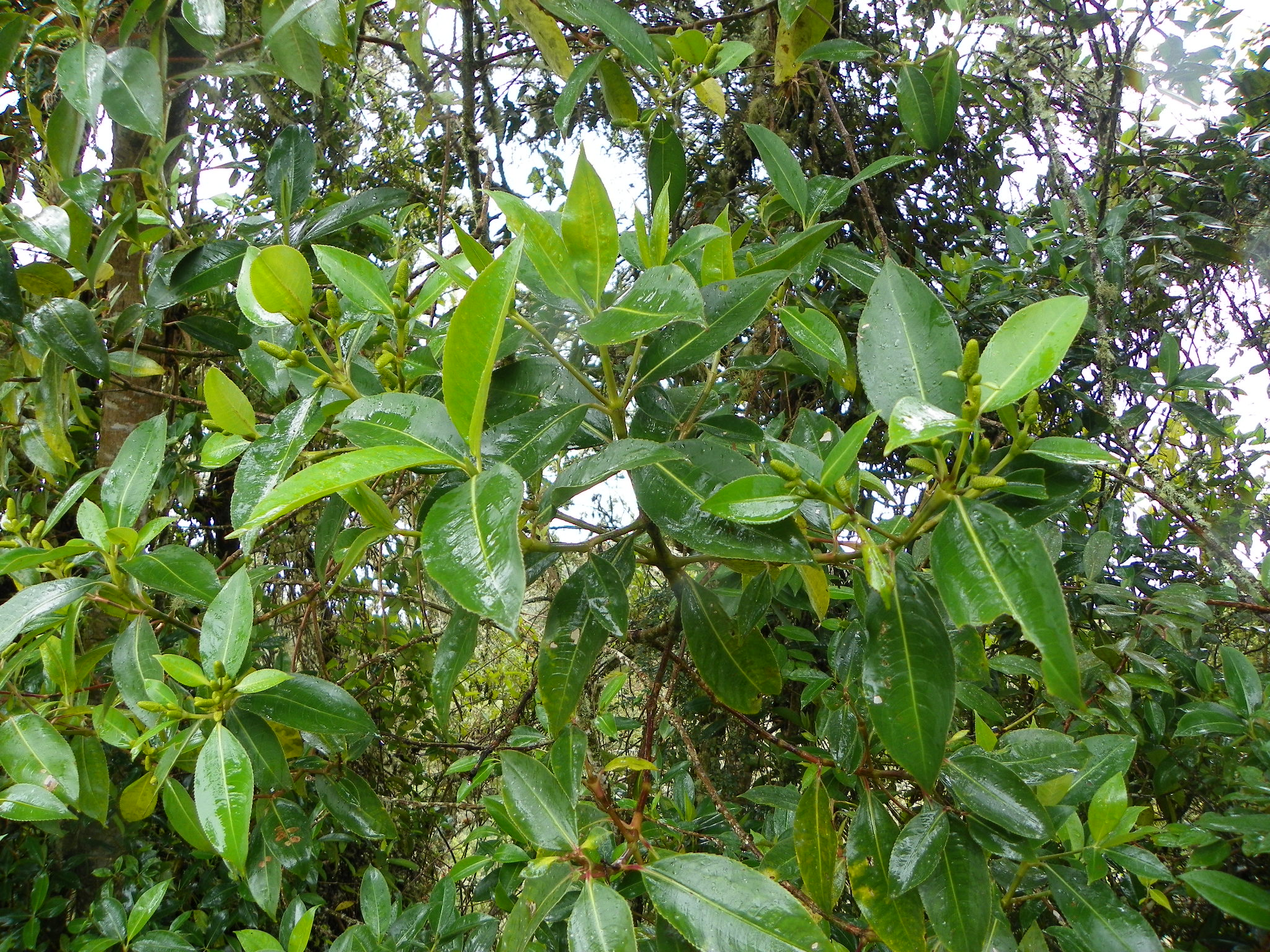 Especie arbórea que se desarrolla en los bosques subandinos y andinos de Colombia.